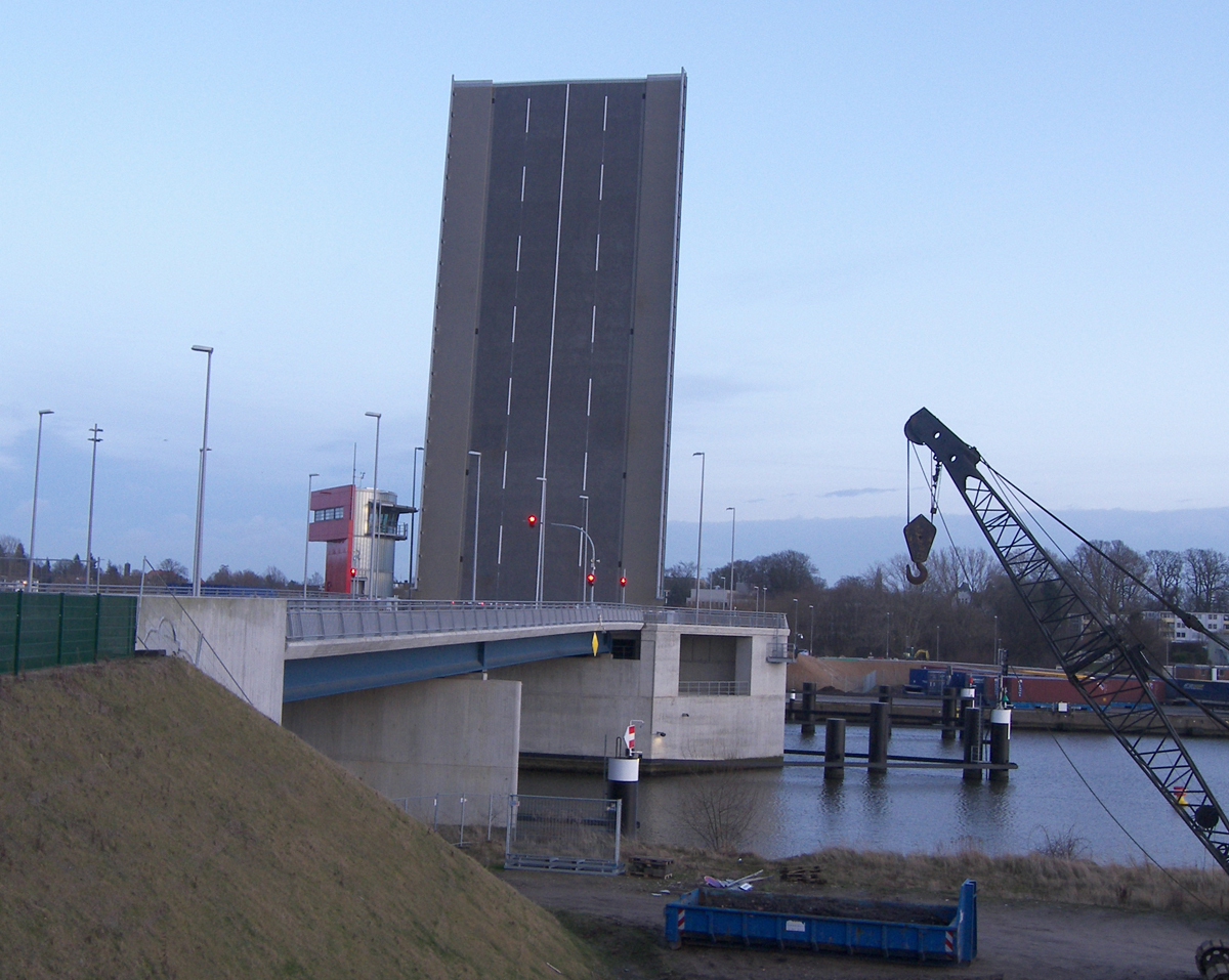 eine noch nicht in Betrieb genommene Brücke der Lübecker Nordtangente aus dem Jahre 2006